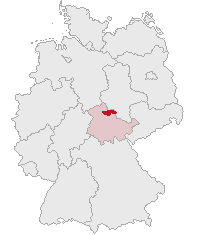 Kyffhäuserkreis, Thuringia, Germany